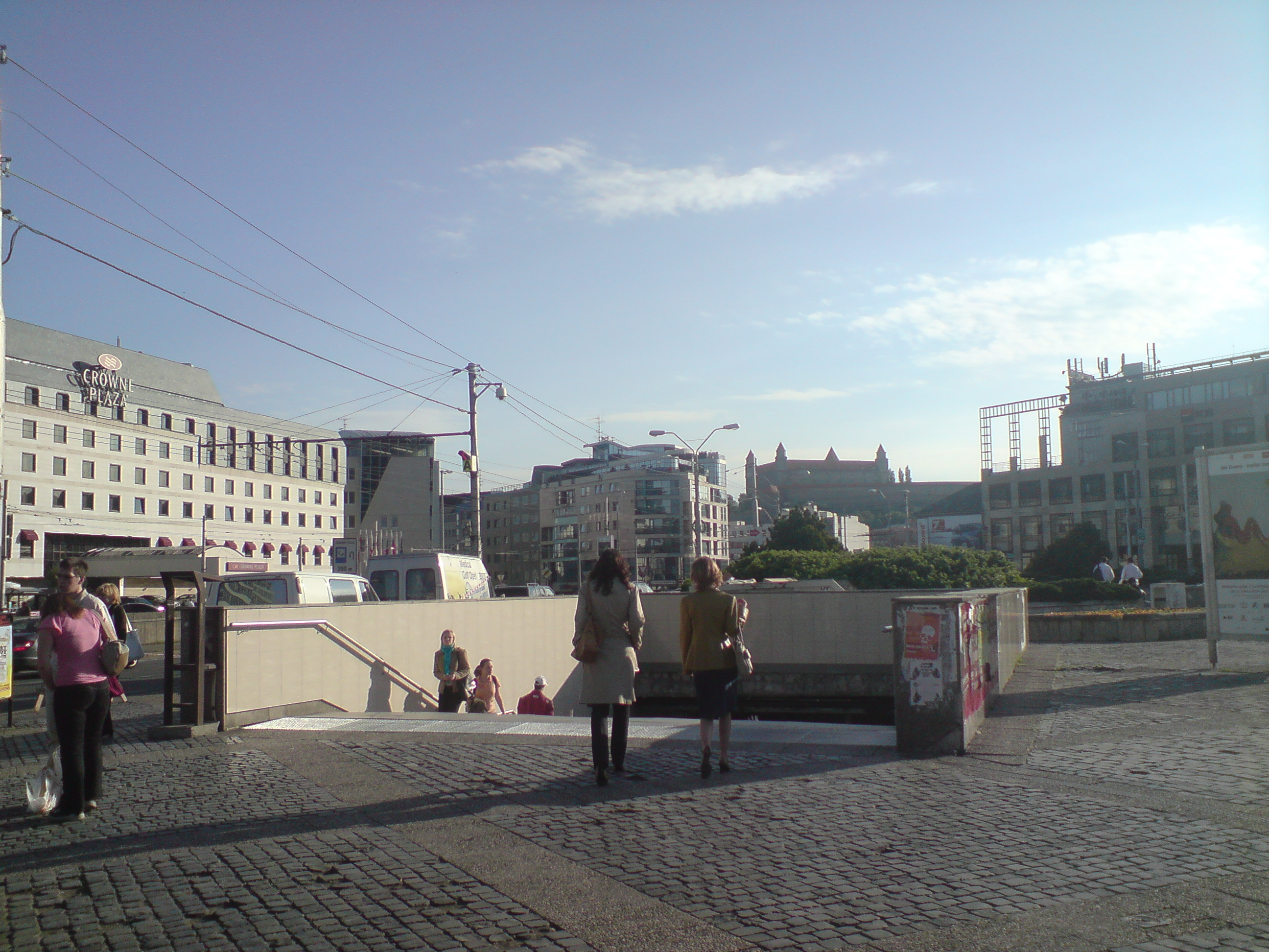 Hodžovo námestie, Bratislava